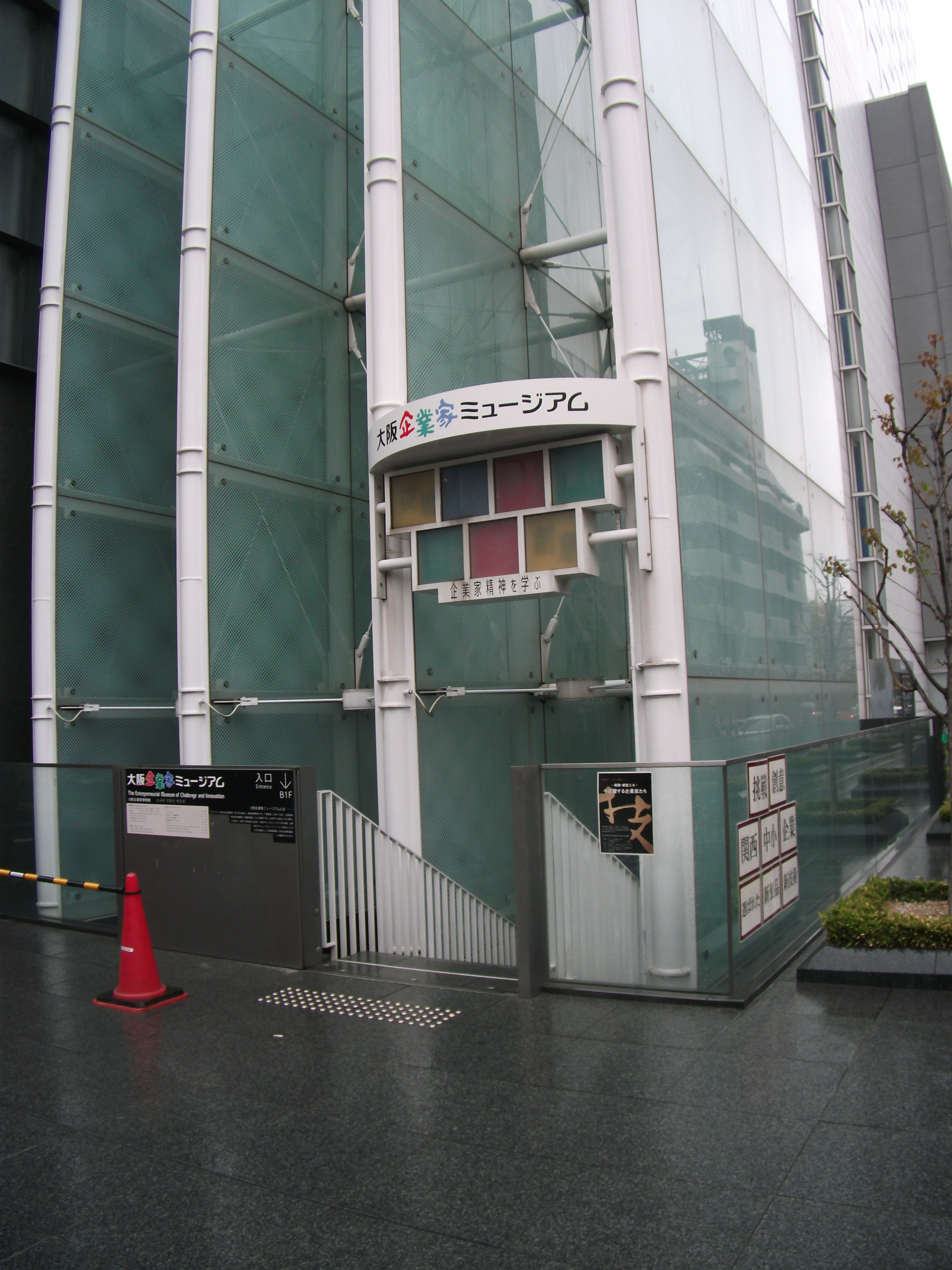 大阪市中央区、大阪企業家ミュージアム